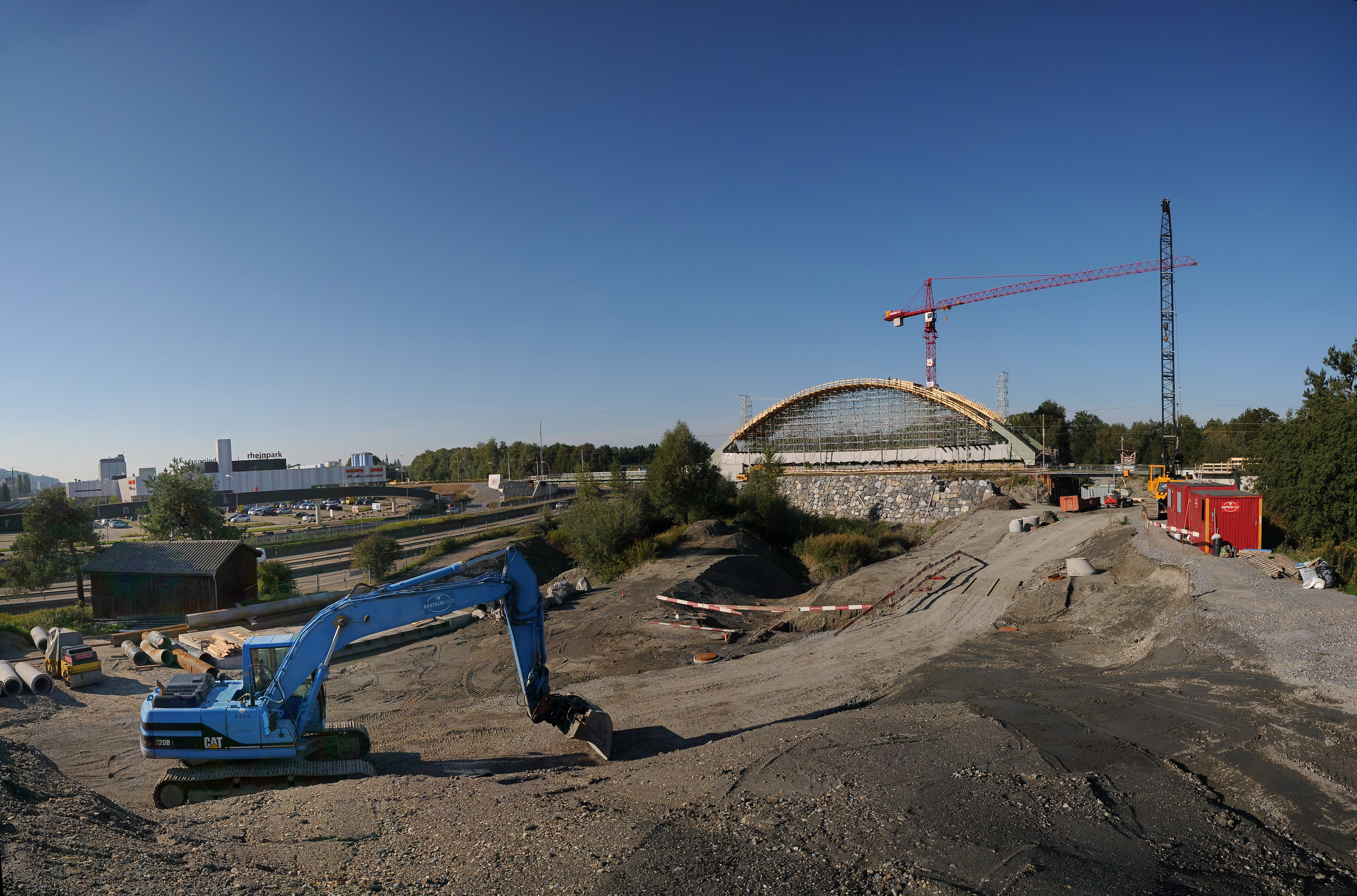 Die neue ÖBB A13 Eisenbahnbrücke verbindet St. Margrethen in der Schweiz und Lustenau in Österreich. Geplante Fertigstellung Frühjahr 2013: A 5840 Lmg Bunker, als Schuppen getarnt, liegt direkt an der A1. Er wurde vom Verein Festungsmuseum Heldsberg übernommen. Koordinaten: 767090 / 257700